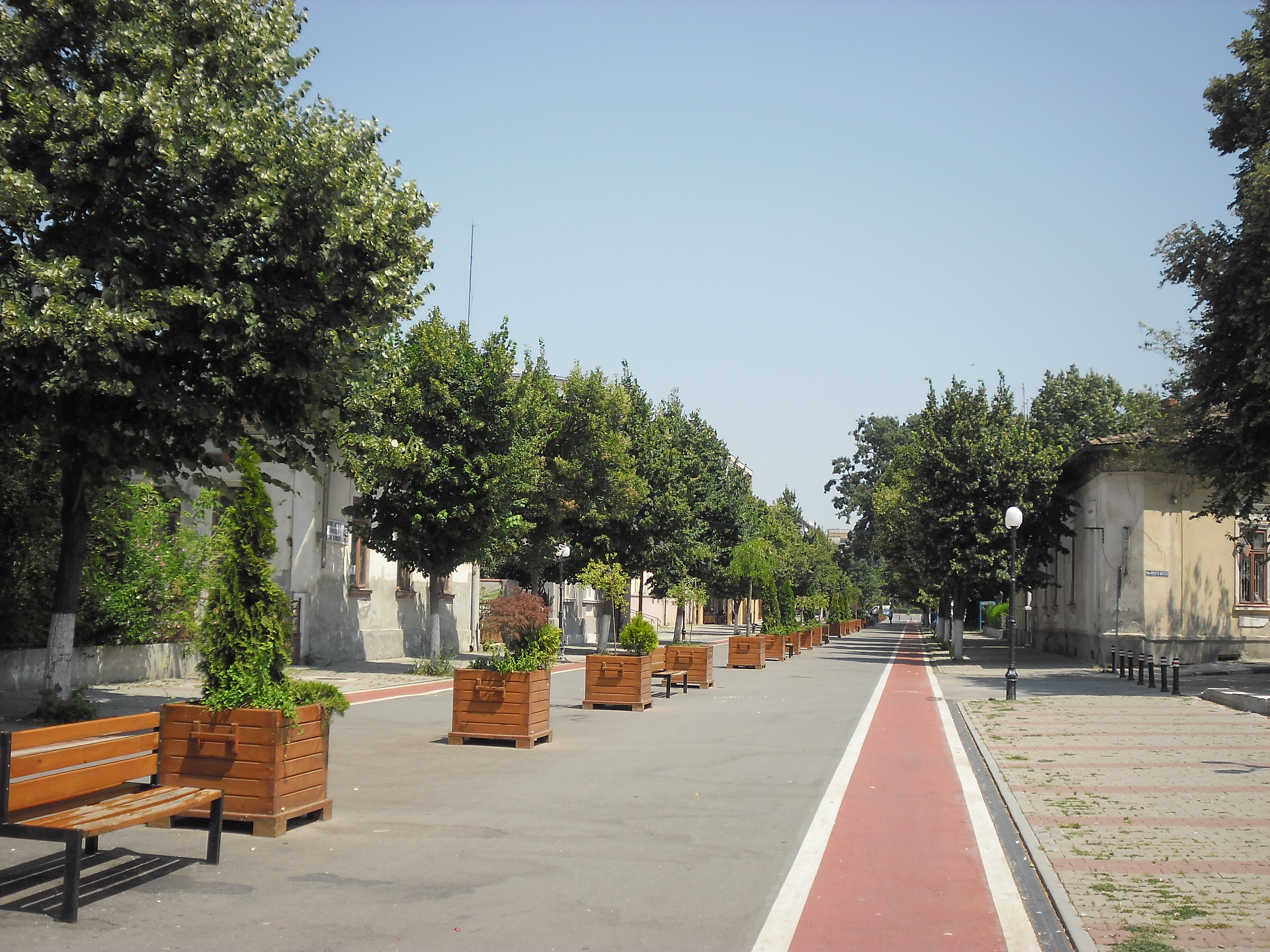 Ansamblul urban "Str. Mircea cel Bătrân"